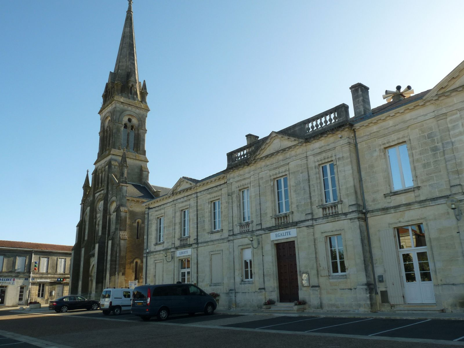 place (mairie et église) de Mirambeau (17), France.